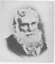 De auteur Robert Govett is meer dan 70 jaar dood (1901).